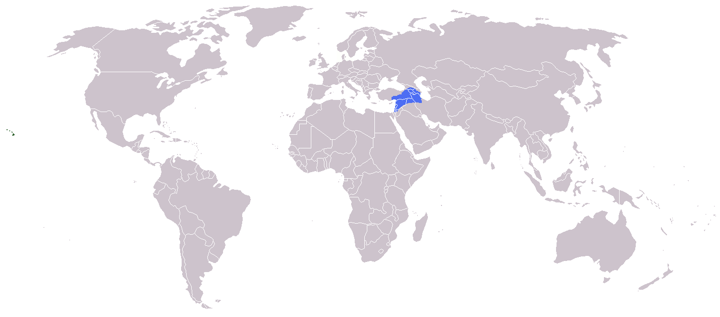 Карта Великой Армении при Тигране II Великом